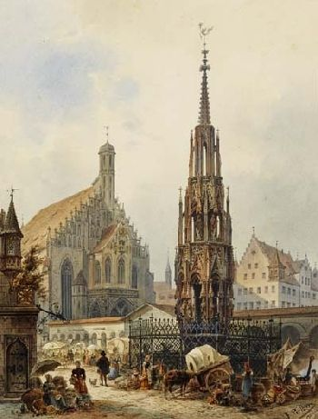 Friedrich Perlberg (1848–1921): Nürnberg, Liebfrauenkirche und Schöner Brunnen; watercolours and pencil, 56,7 x 43 cm